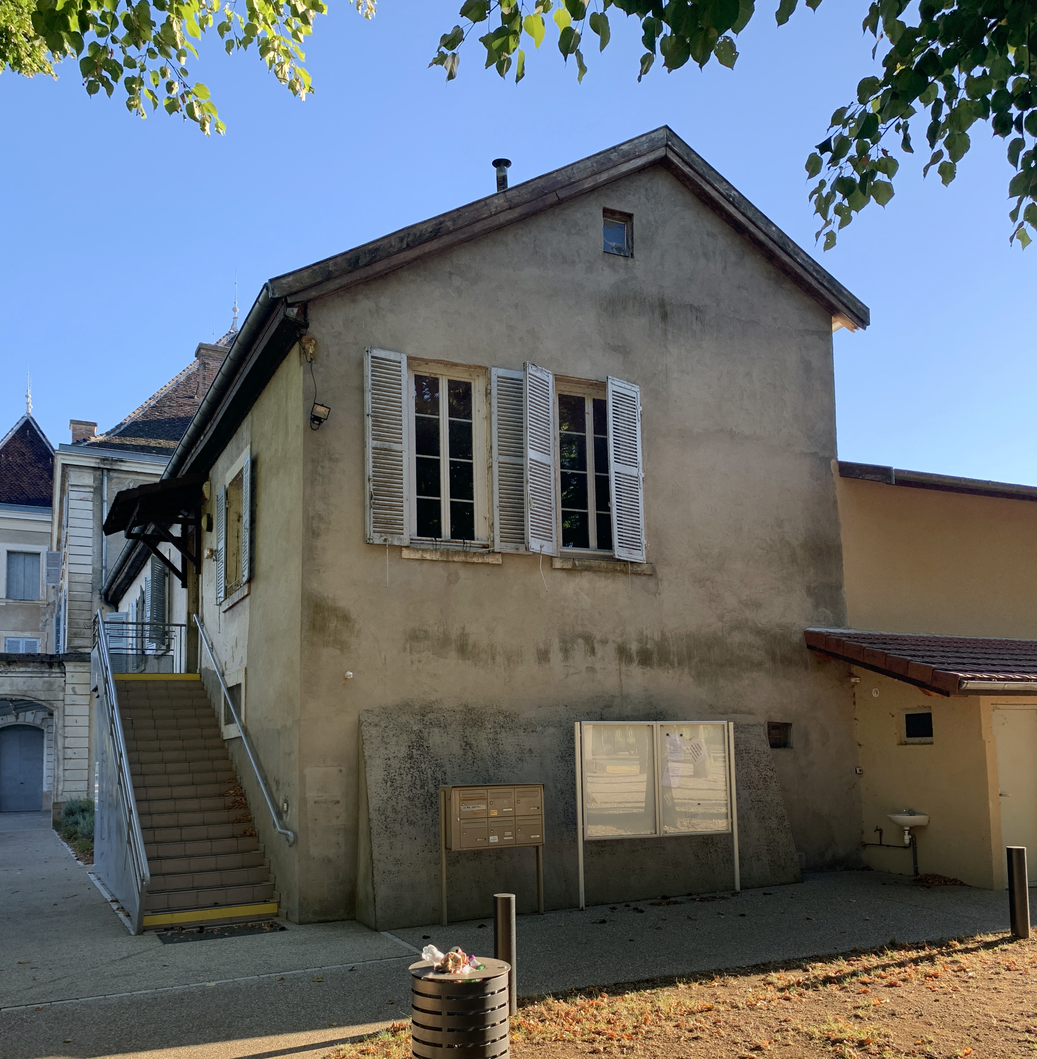 Mairie de Charnoz-sur-Ain.